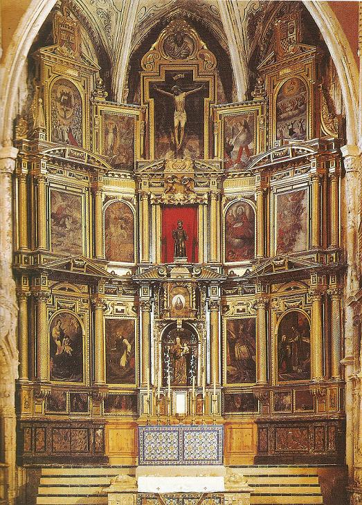 Altar mayor de la iglesia del Monasterio de Santa Clara de Moguer.